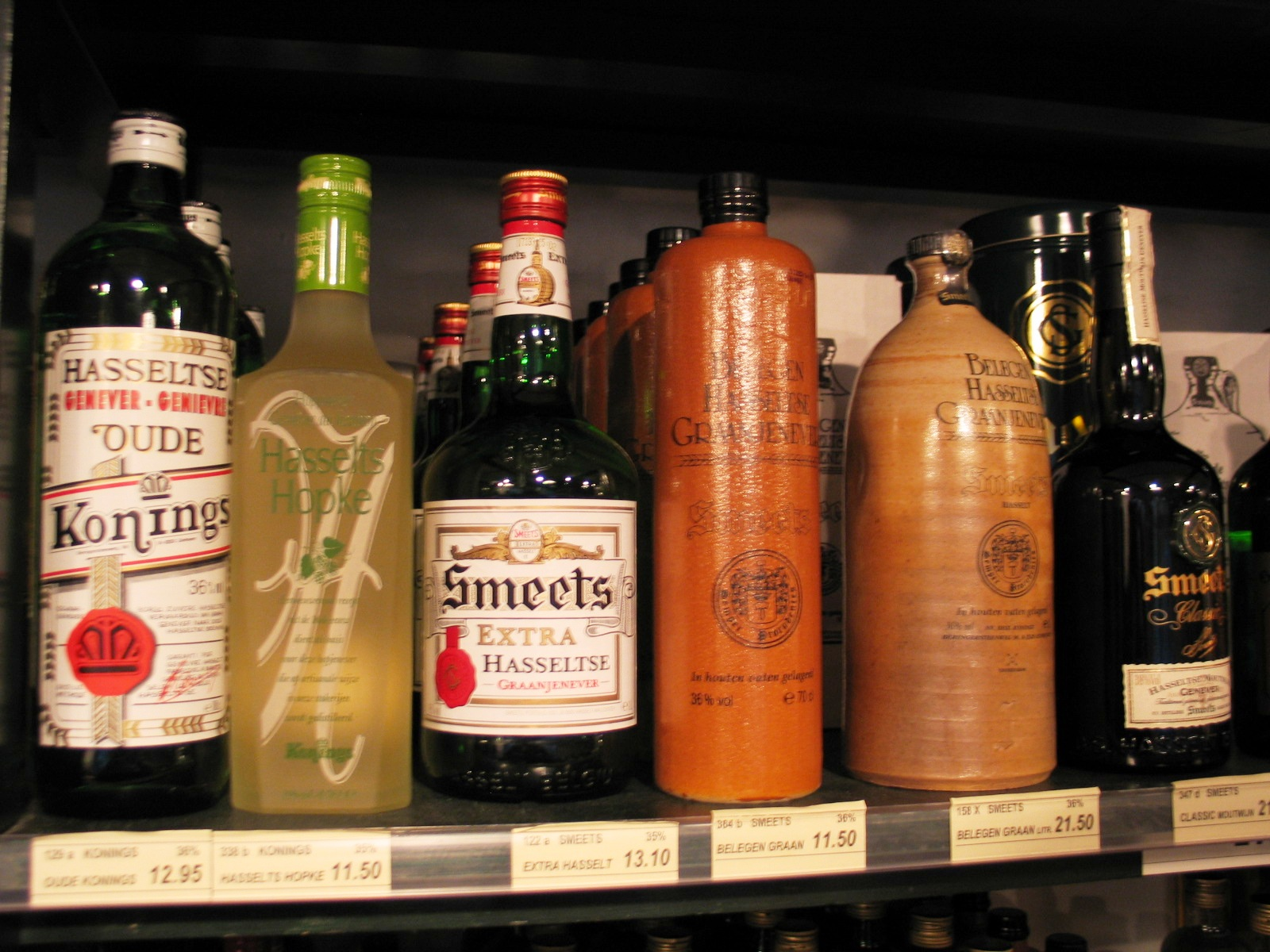 Hasseltse jenever